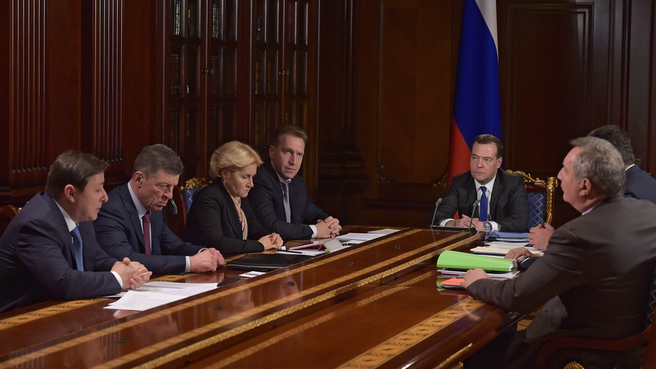 Совещание главы Правительства РФ Д. А. Медведева с вице-премьерами 2 февраля 2015 года.